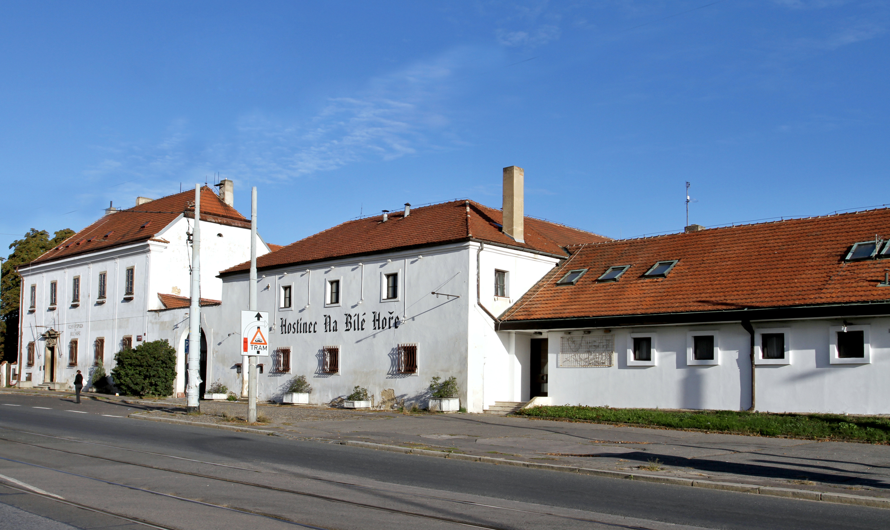 Velká hospoda na Bílé hoře, s kaplí svatého Martina, Praha-Řepy, Karlovarská 1/4, 49/2